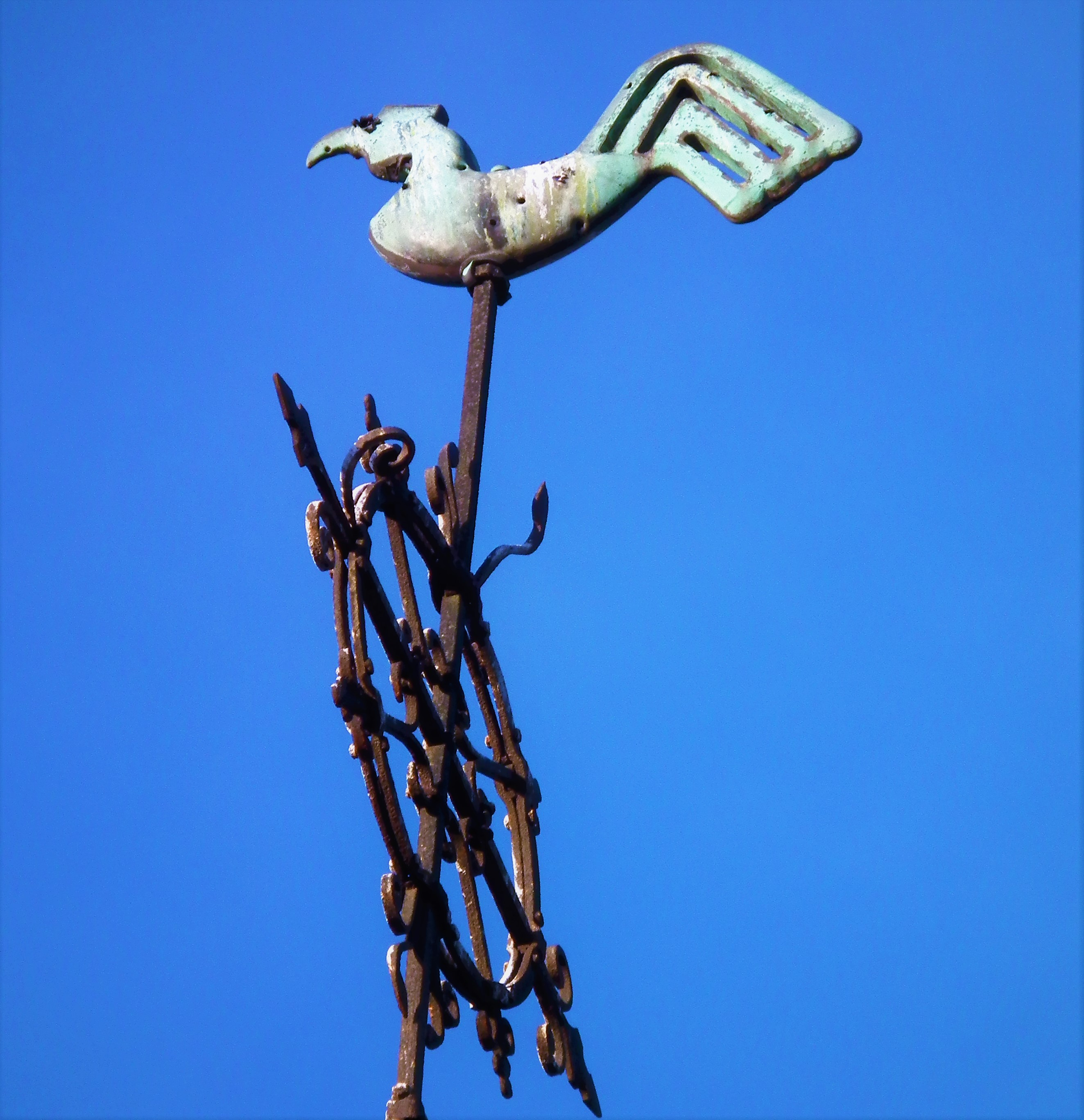 Kosciół Chrystusa Króla w Bronowicach koło Strzelec Krajeńskich.